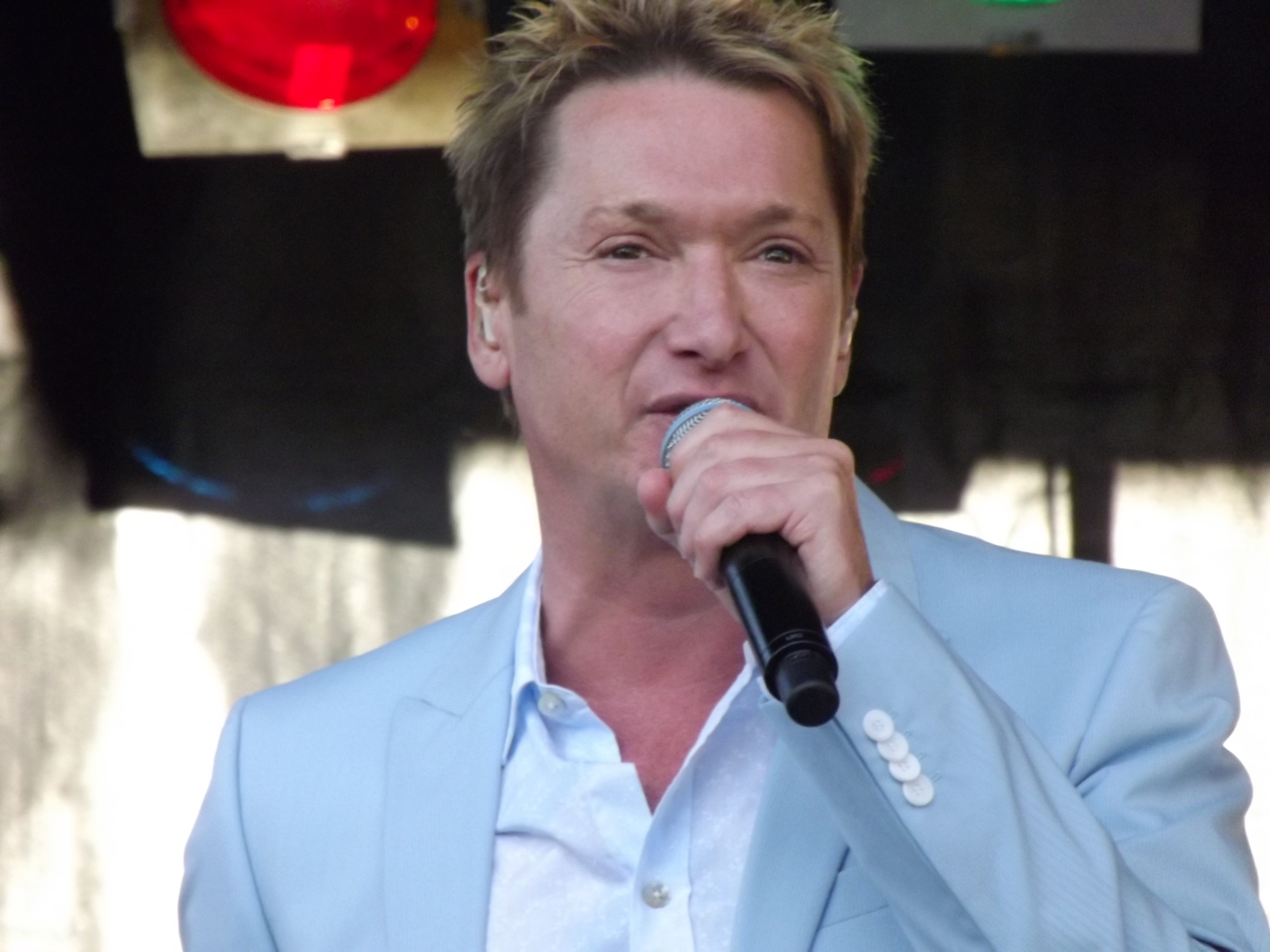 Foto van Bart Kaëll tijdens de Sint-Pietersfeesten in Brugge